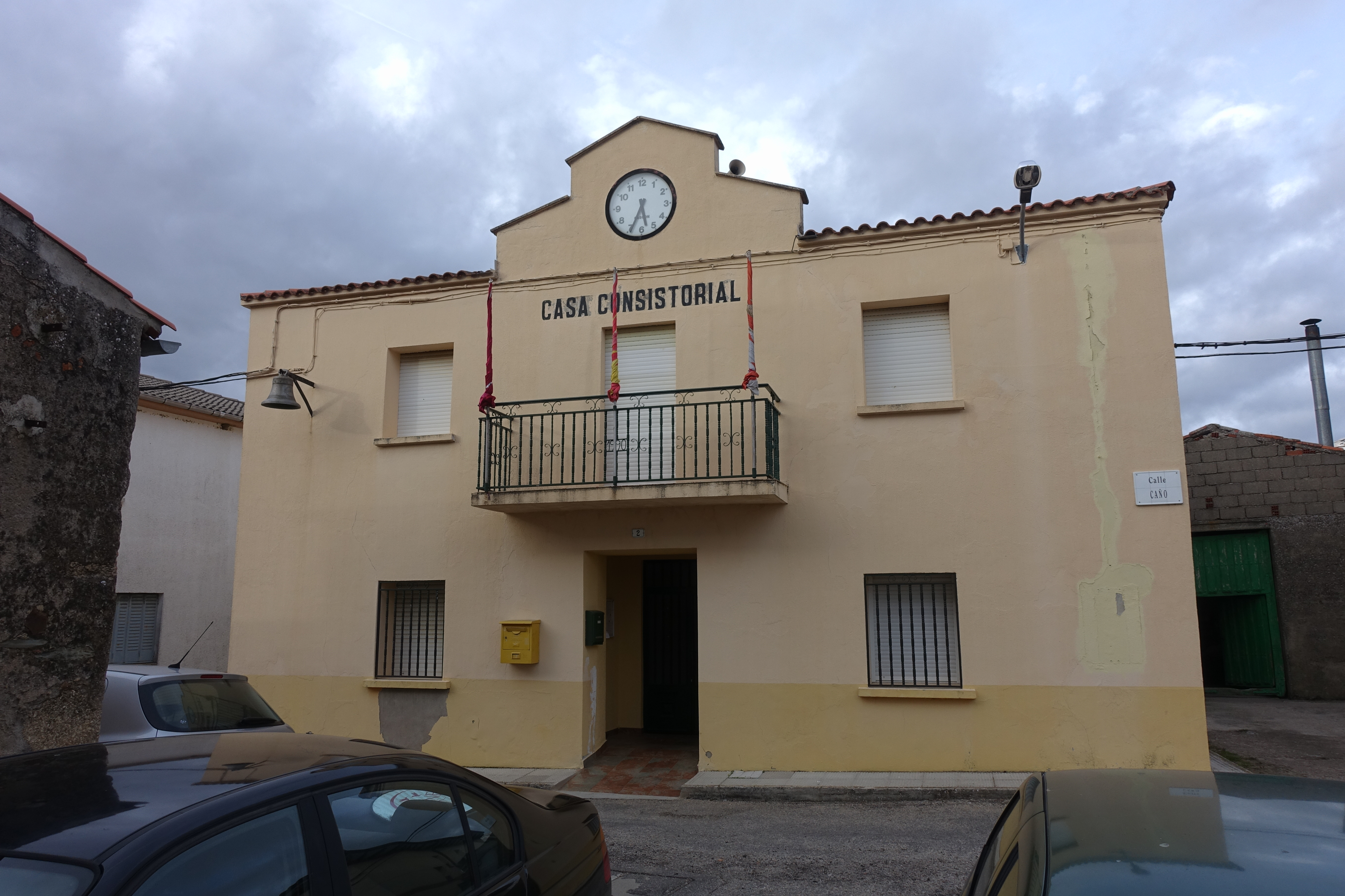 Casa consistorial de El Sahugo (Salamanca, España).